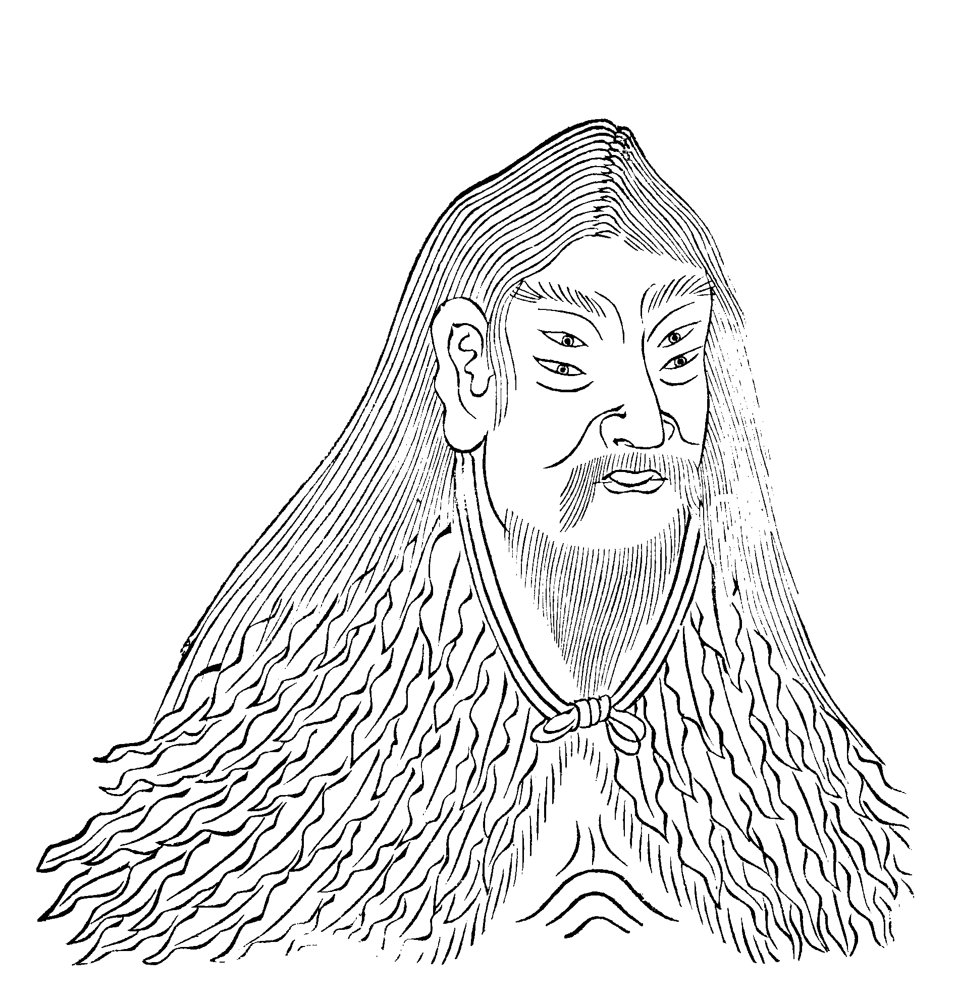 倉頡